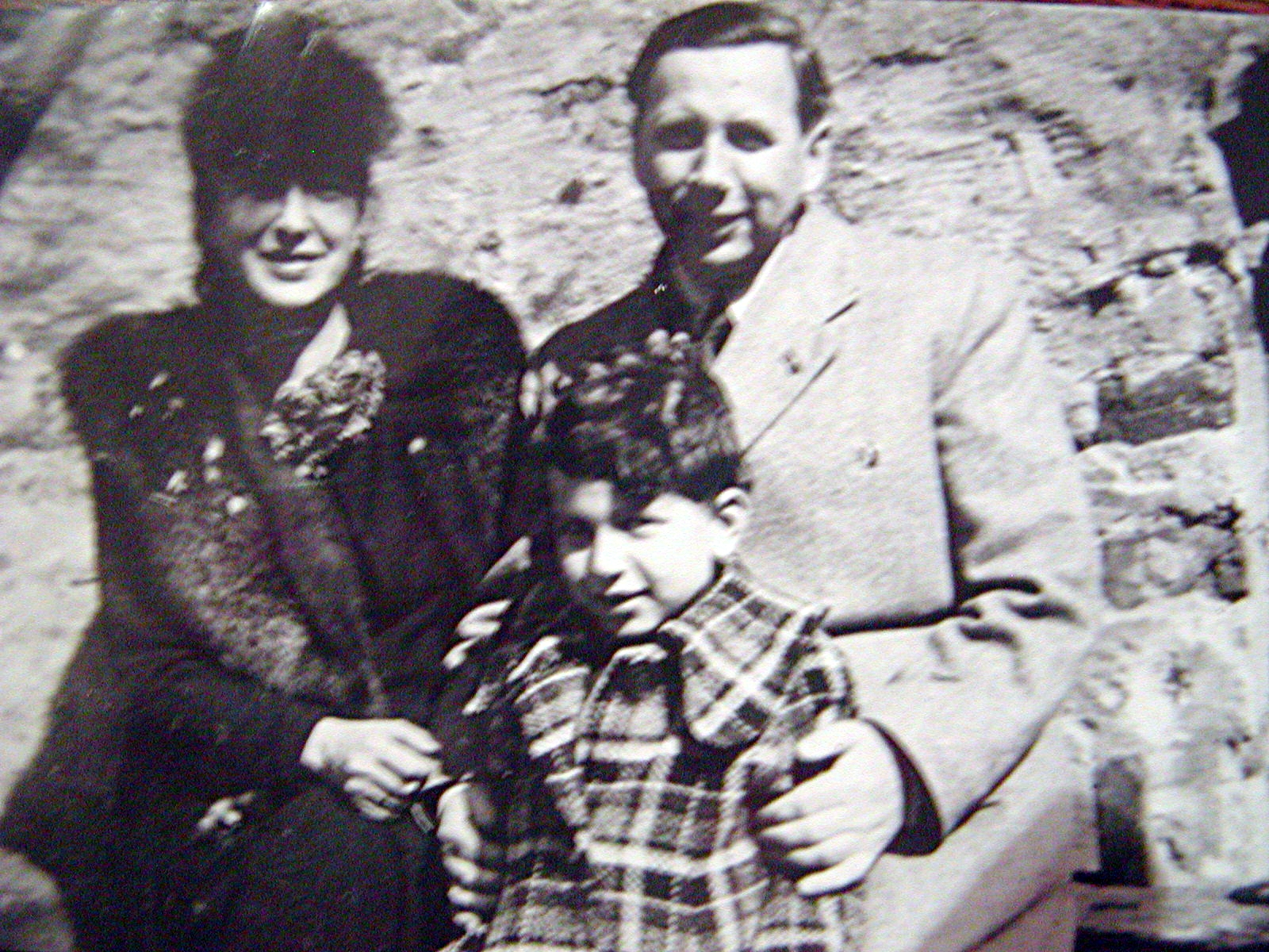 Gerda von Freymann-Knispel mit ihrem Mann Alfred Knispel und ihrem Sohn Alexander, Schwiebus 1944 Quelle: selbst erstellt, bzw. aus eigenem Archiv